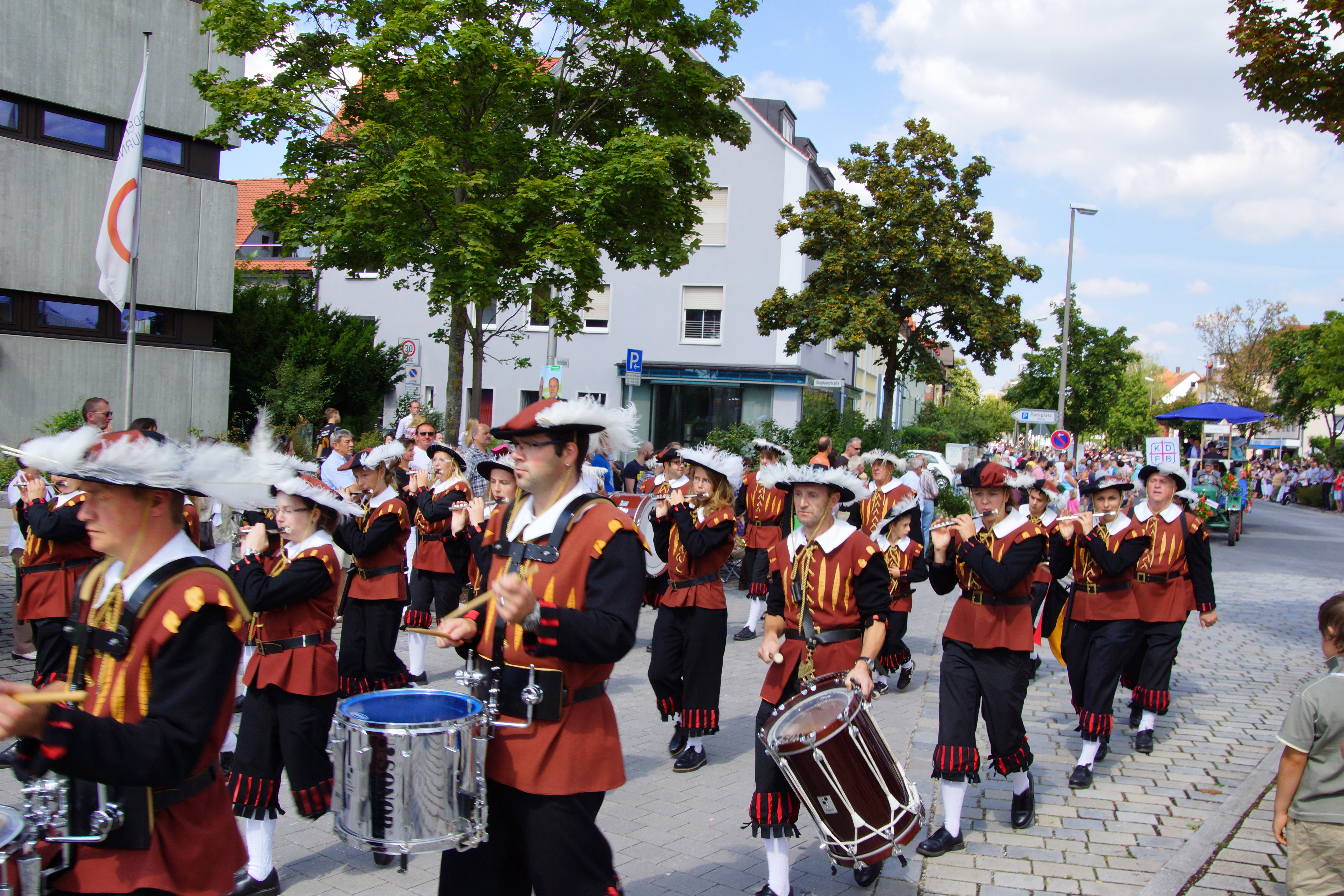 Der Volksfestumzug im Jahr 2013 in der Oberpfälzer Kreisstadt Neumarkt